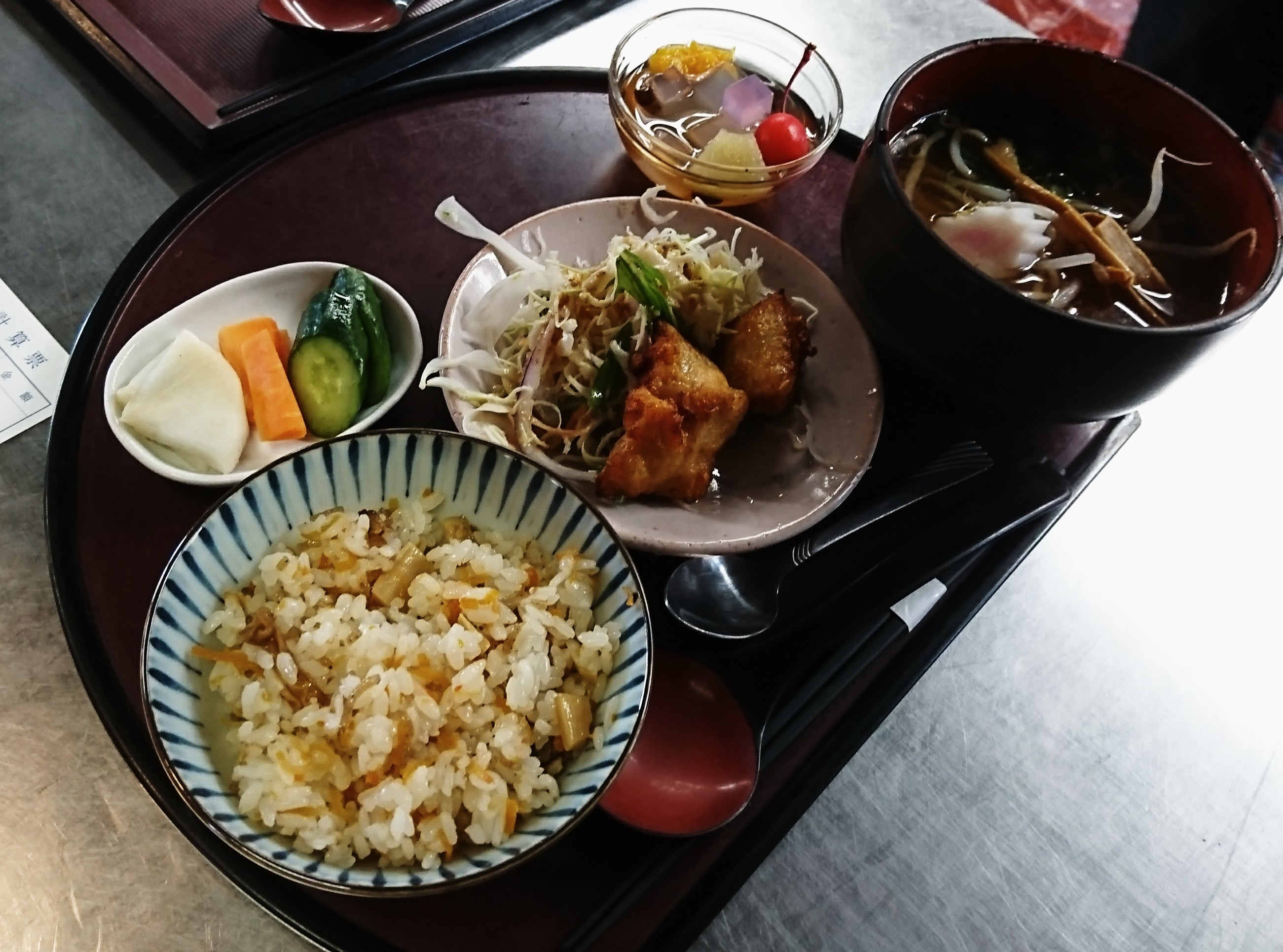 茶屋メニュー